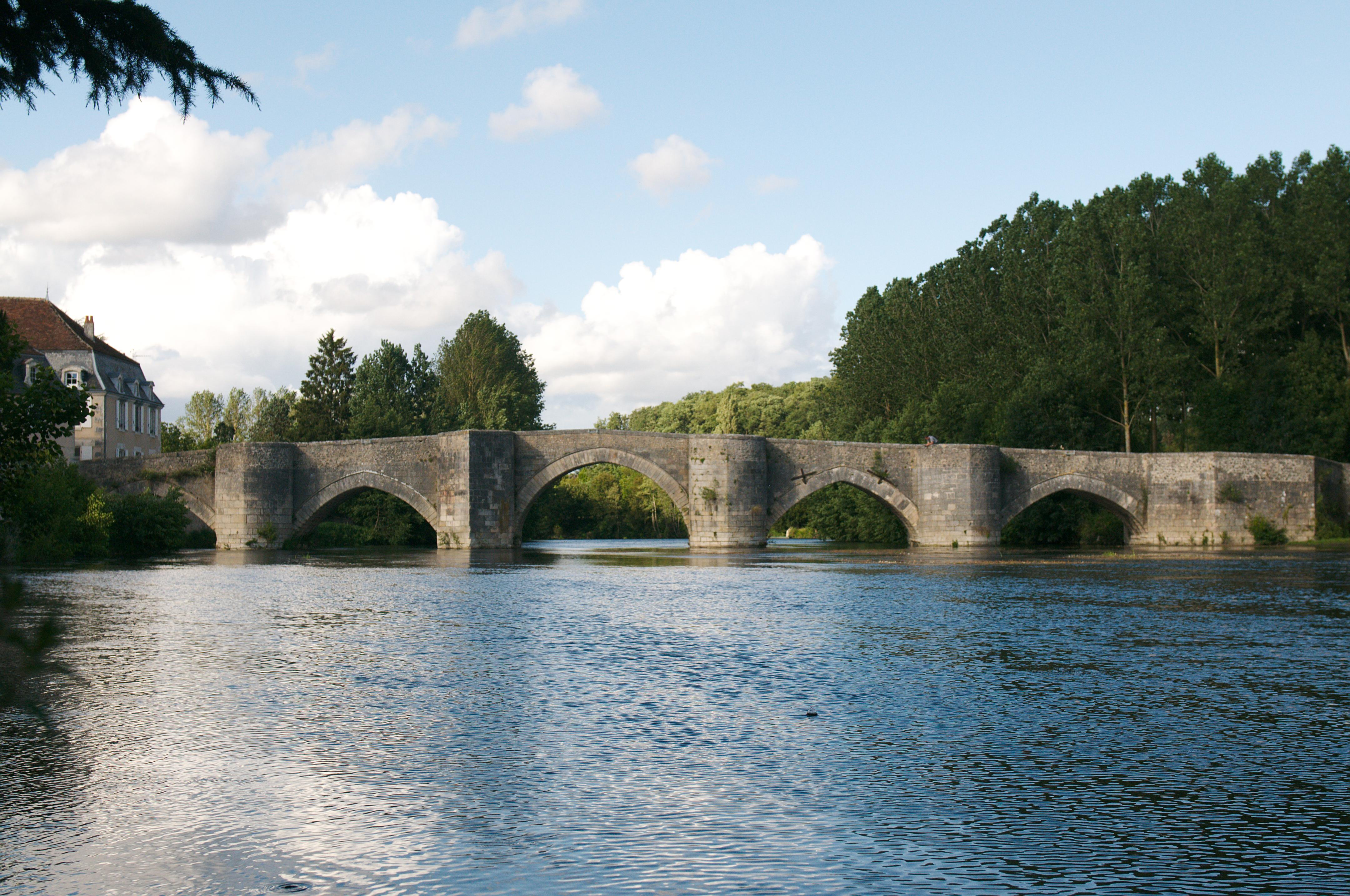 Le Vieux Pont, reliant St Germain et St Savin, vu d'en desous du Pont Neuf, reliant ces deux mêmes villes.